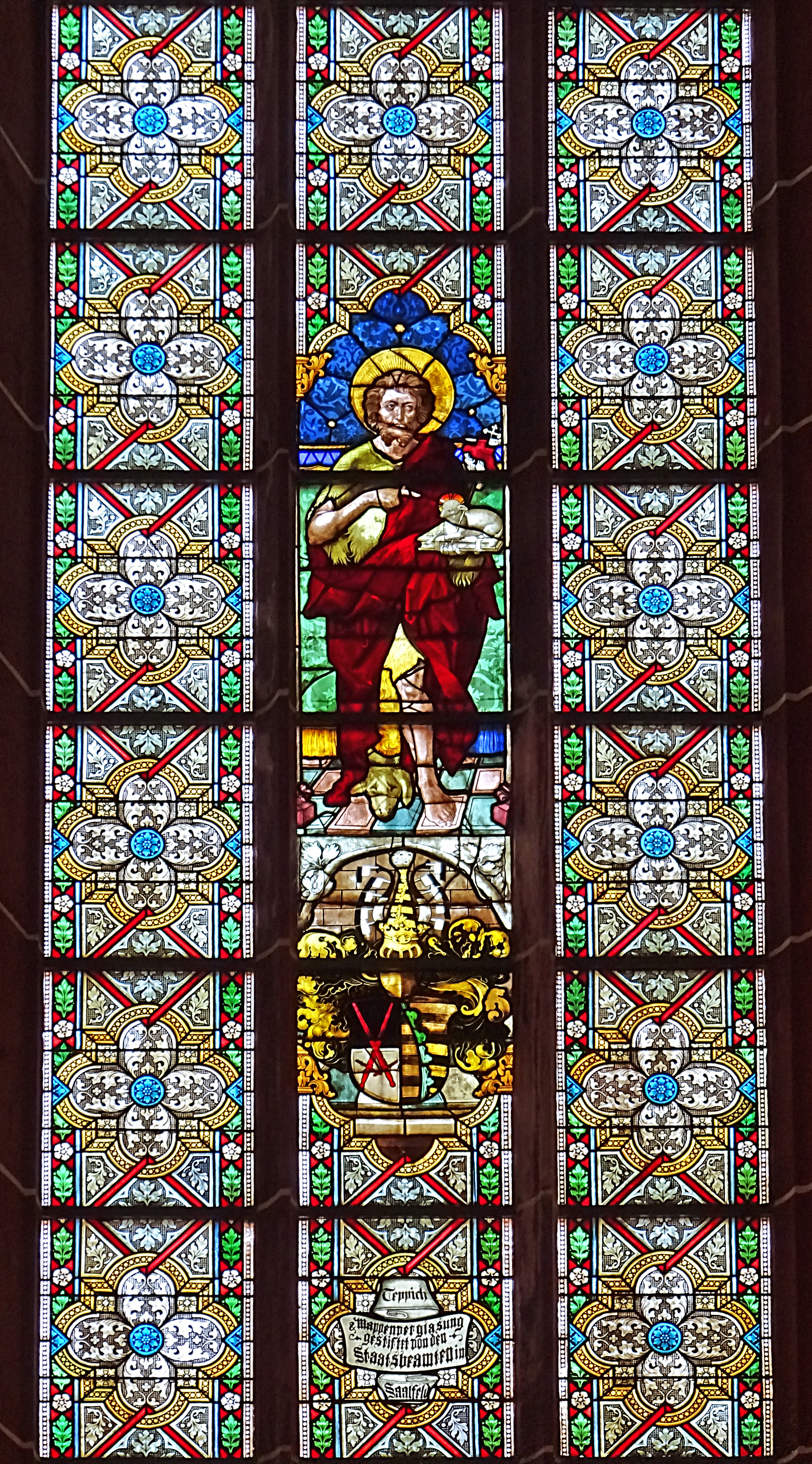 Johannes der Täufer, Buntglasfenster in der Johanneskirche Saalfeld